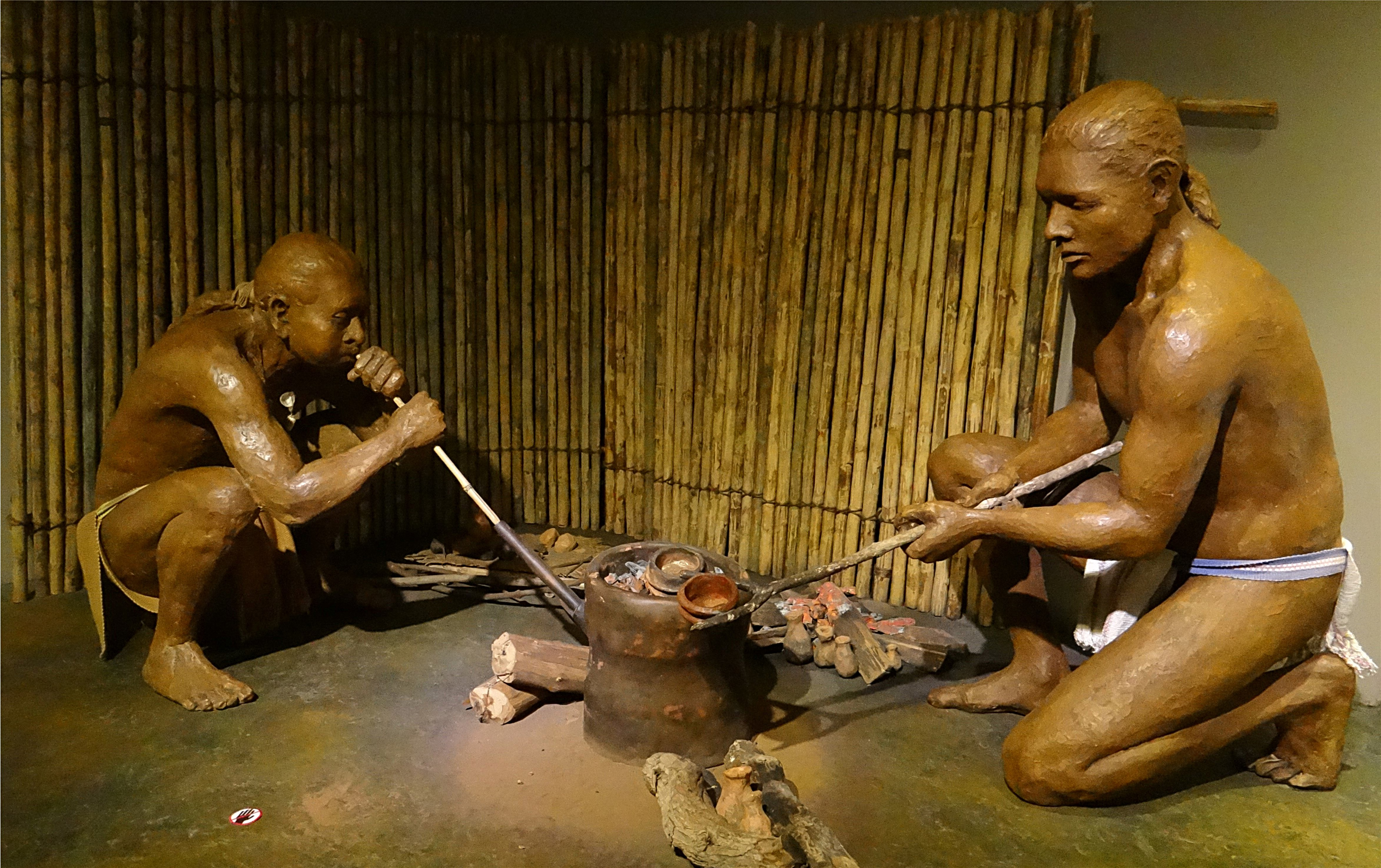 Diorama : Métallurgie de l'or, Musée de l'Or précolombien, San José, Costa Rica.